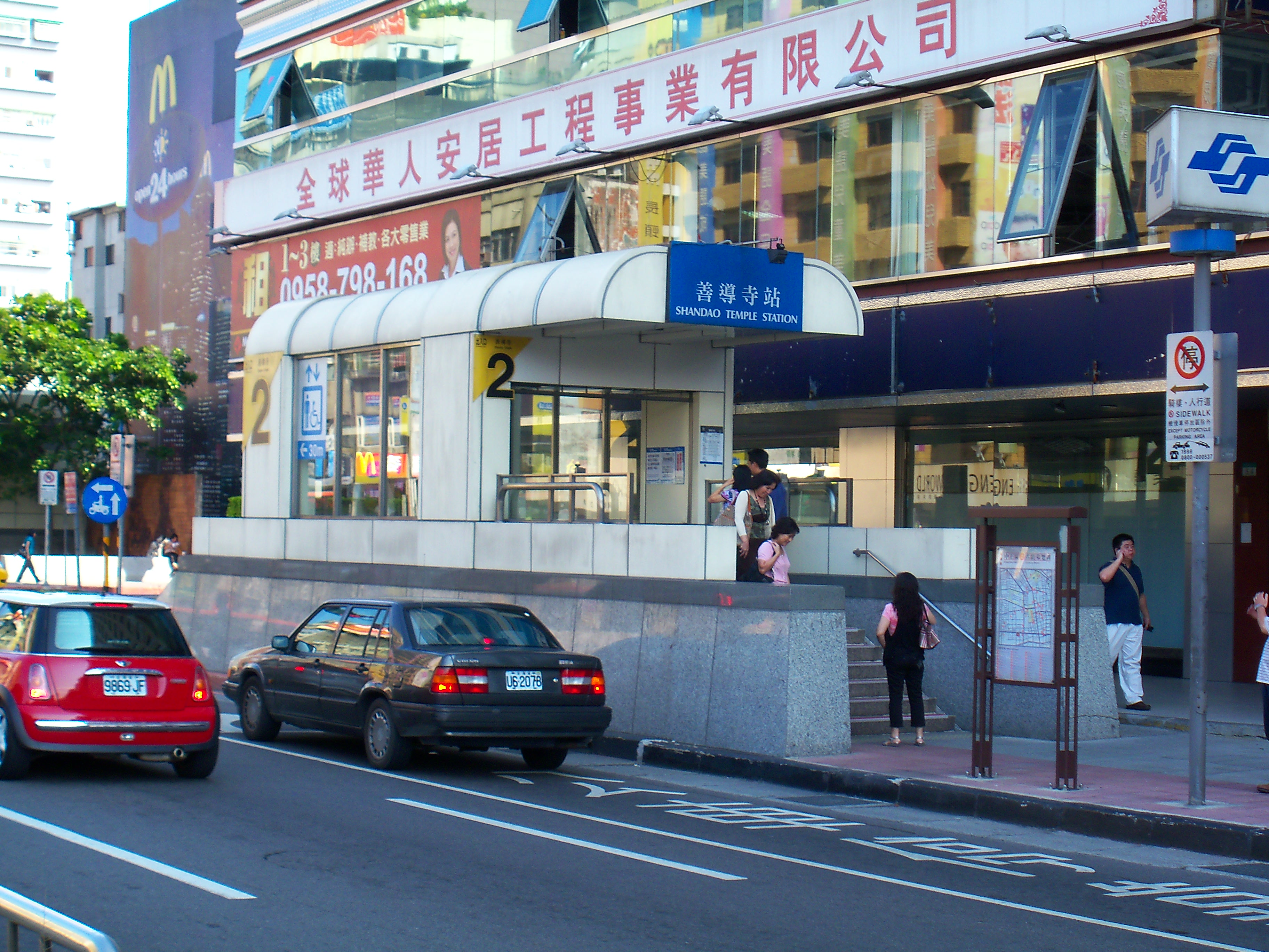 台北捷運南港線善導寺駅の2号出口。